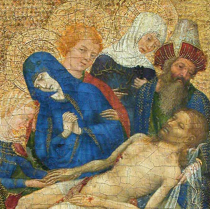 detail